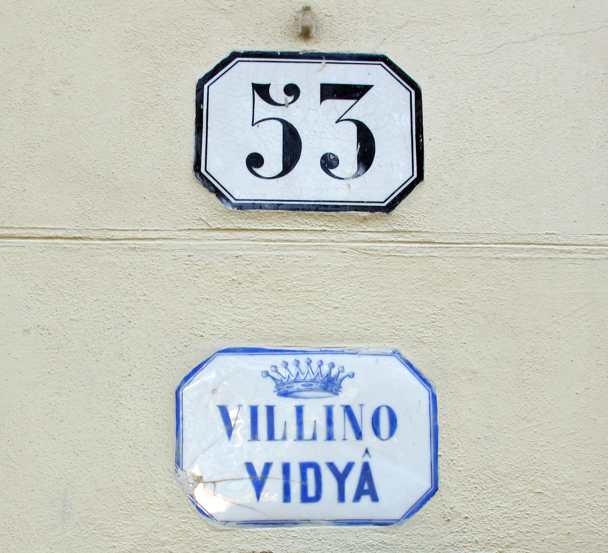 Viale Antonio Gramsci, Firenze